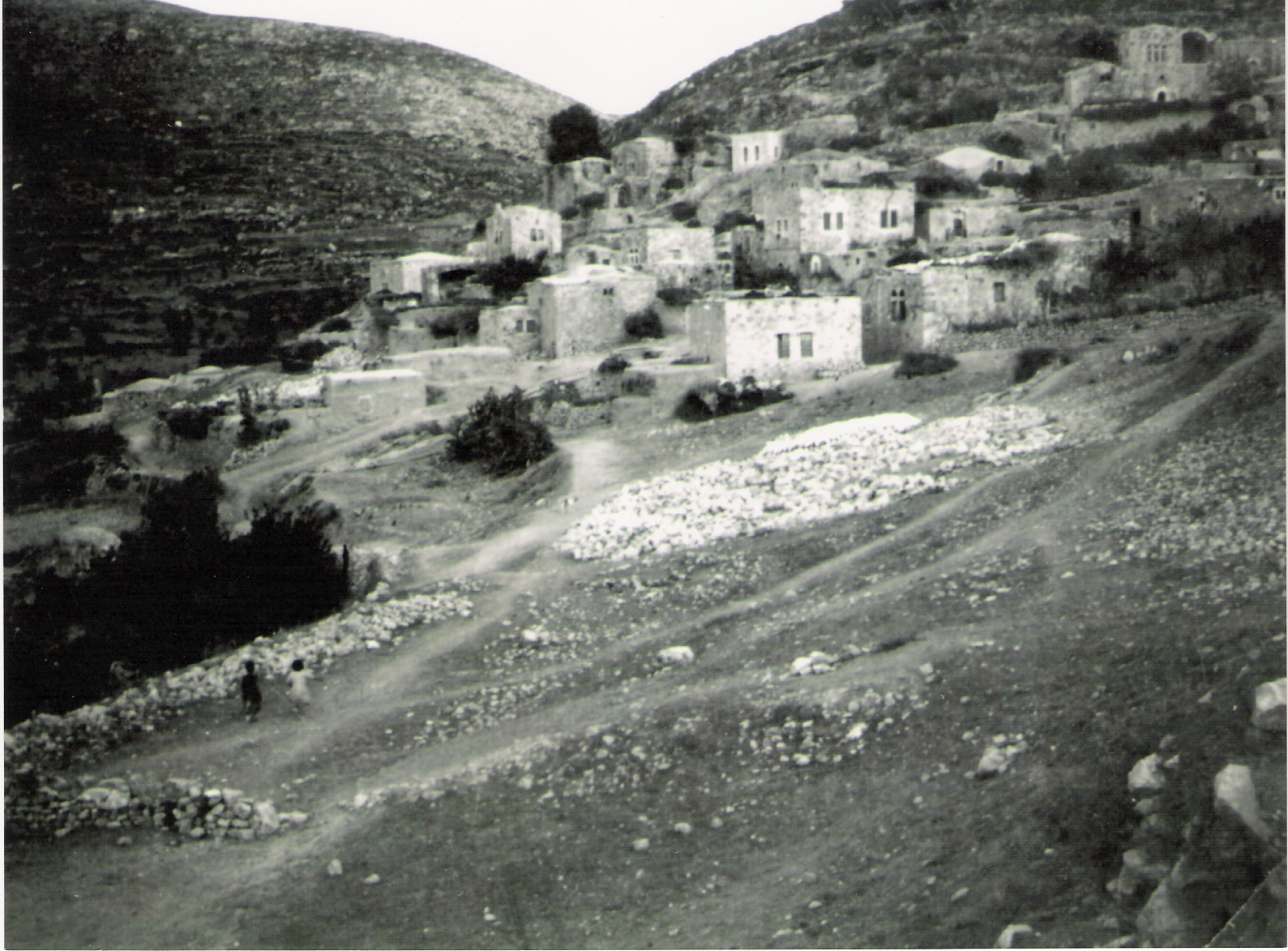 Nisf_Jubeil, West bank, Palestine, 1936